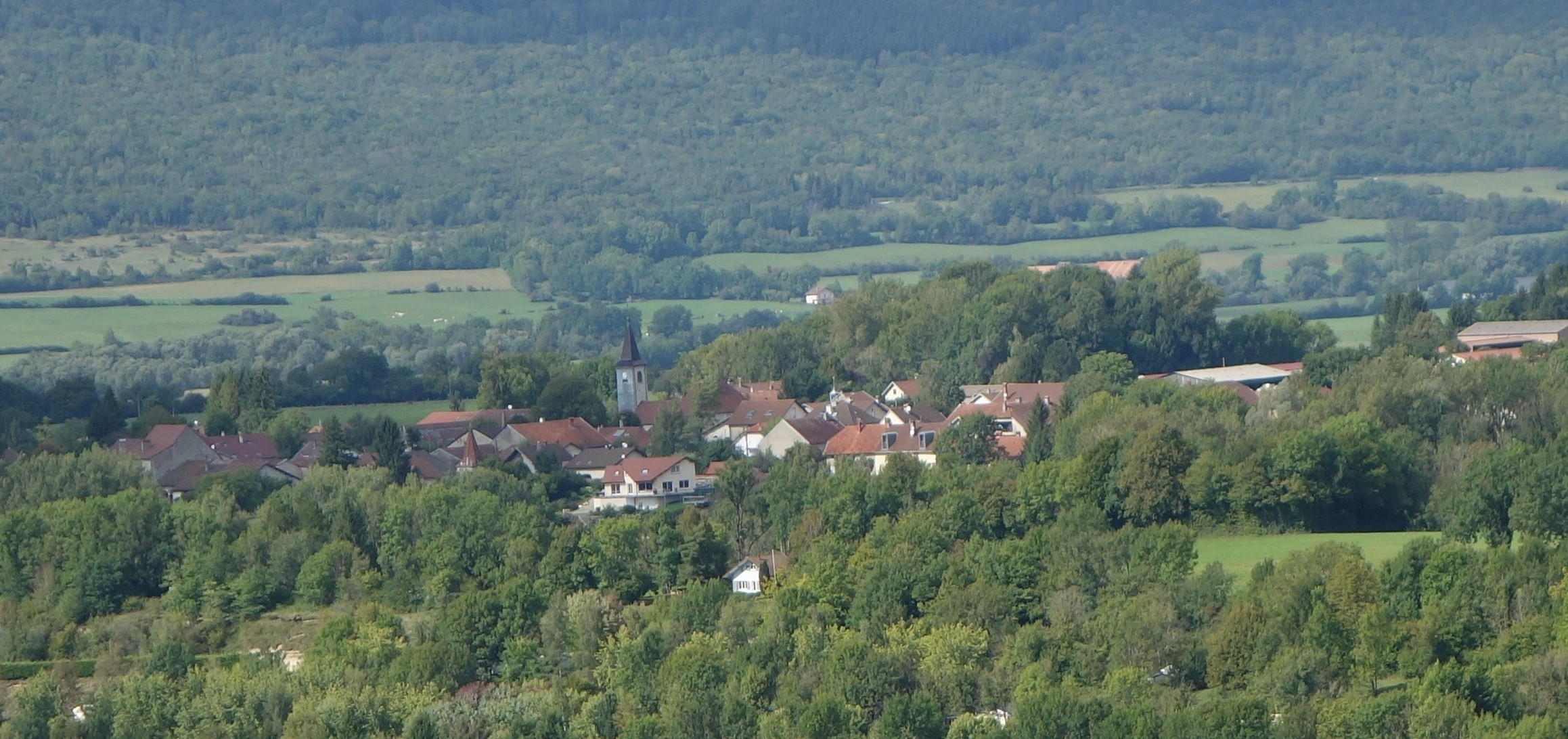 Village de Marigny (Jura) : vue d'ensemble